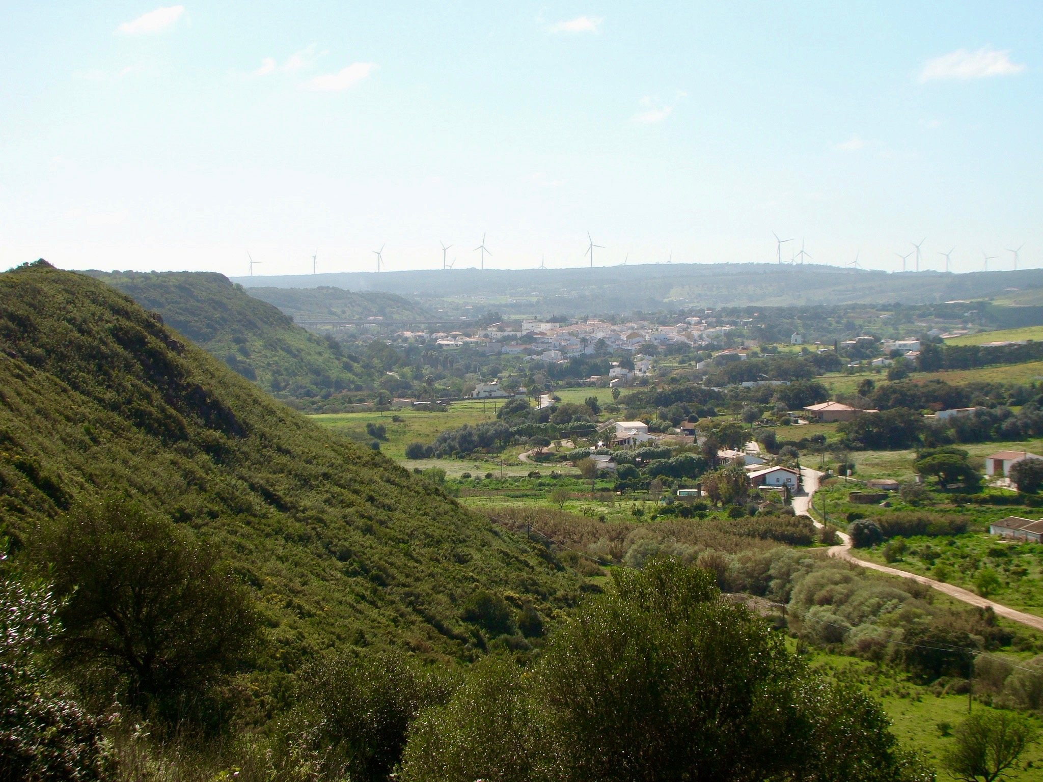 Vista de Bensafrim.